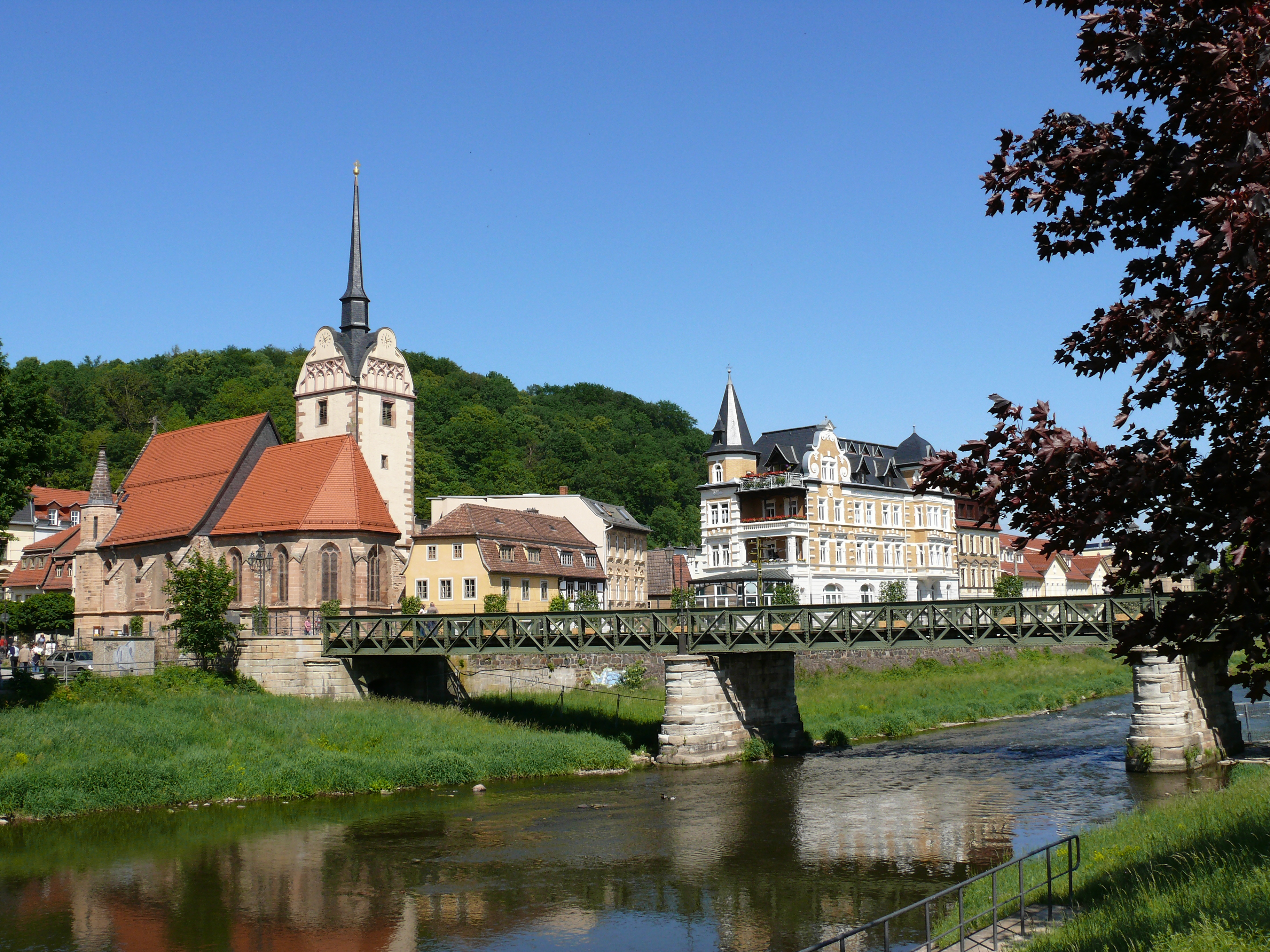 St. Marienkirche in Gera-Untermhaus, 2007